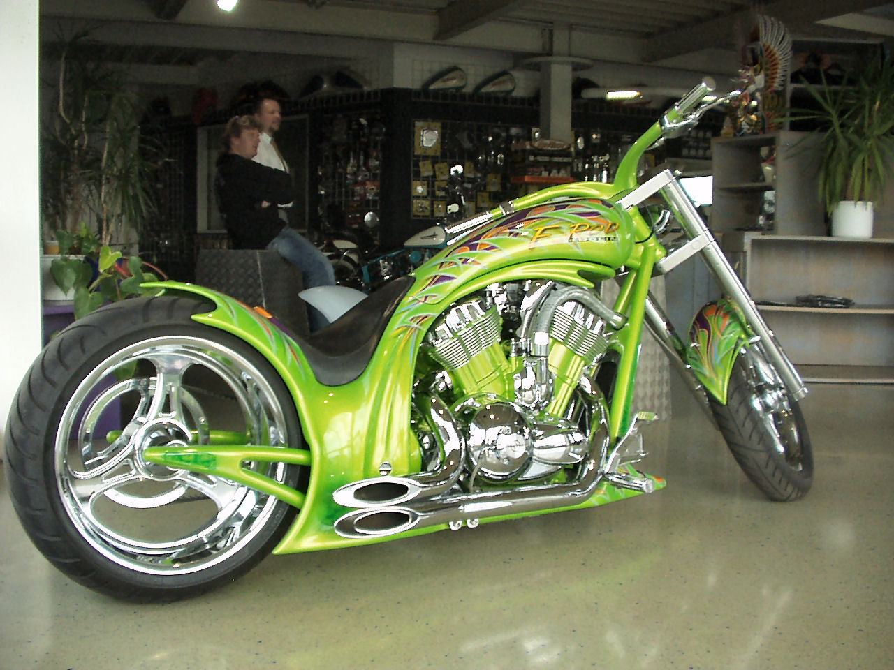 FROD Custom Bike von Fred Kodlin